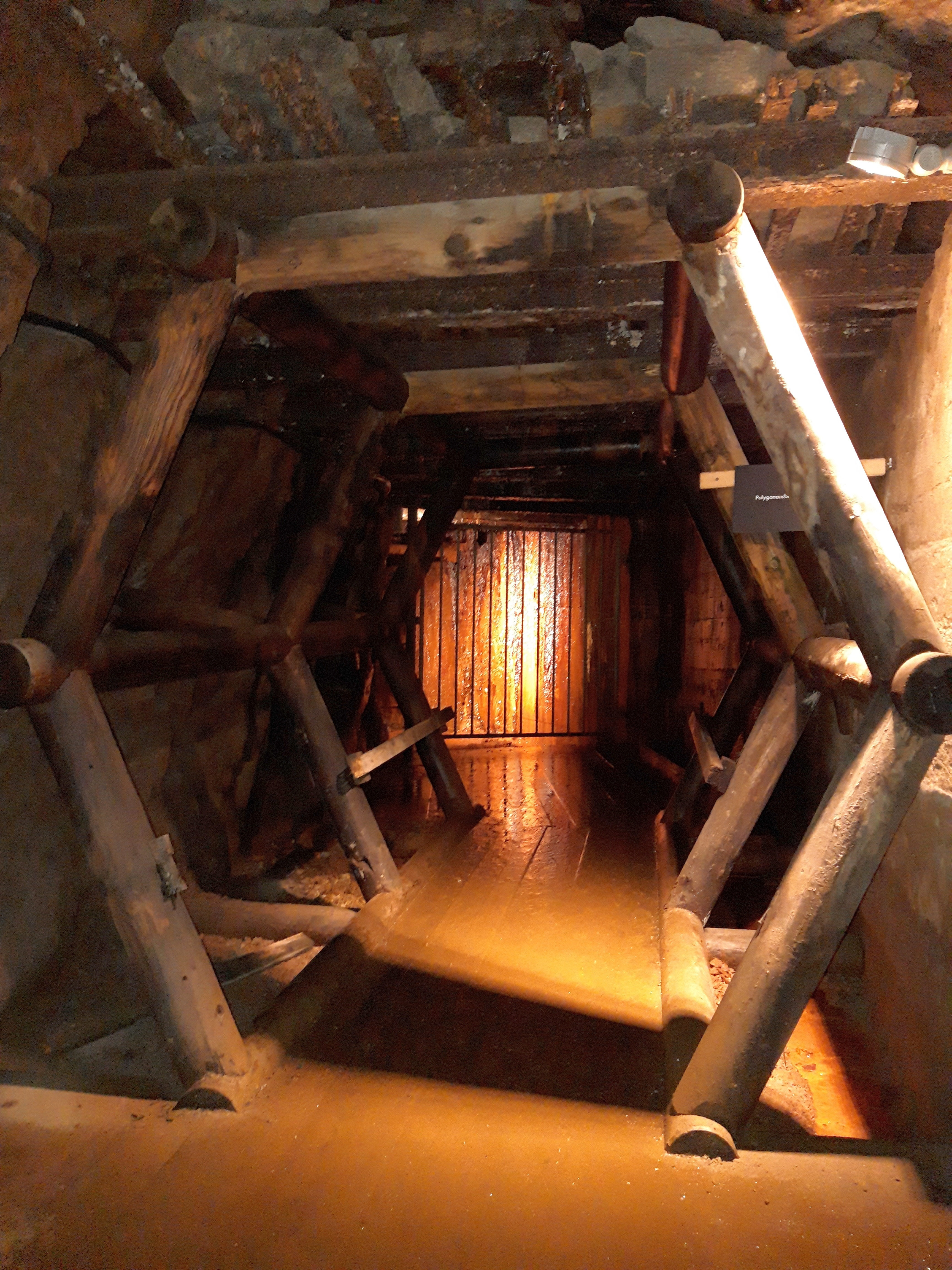 Unten offener Holz-Polgonausbau unter Tage.